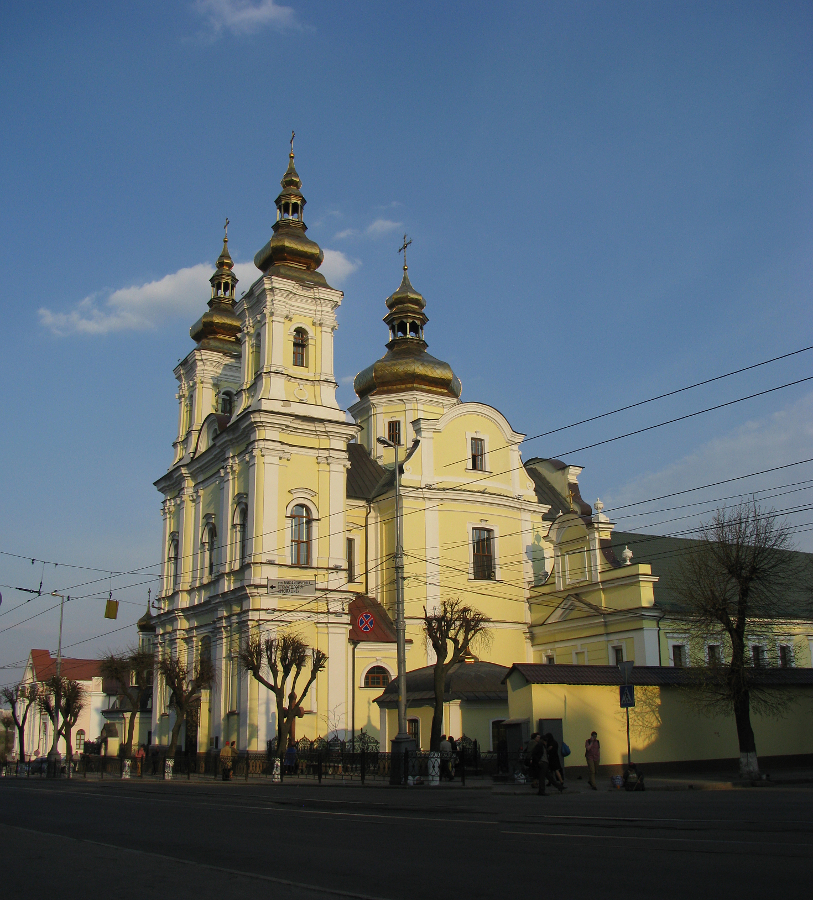 Монастир домініканців, Вінниця, вул. Соборна, 21